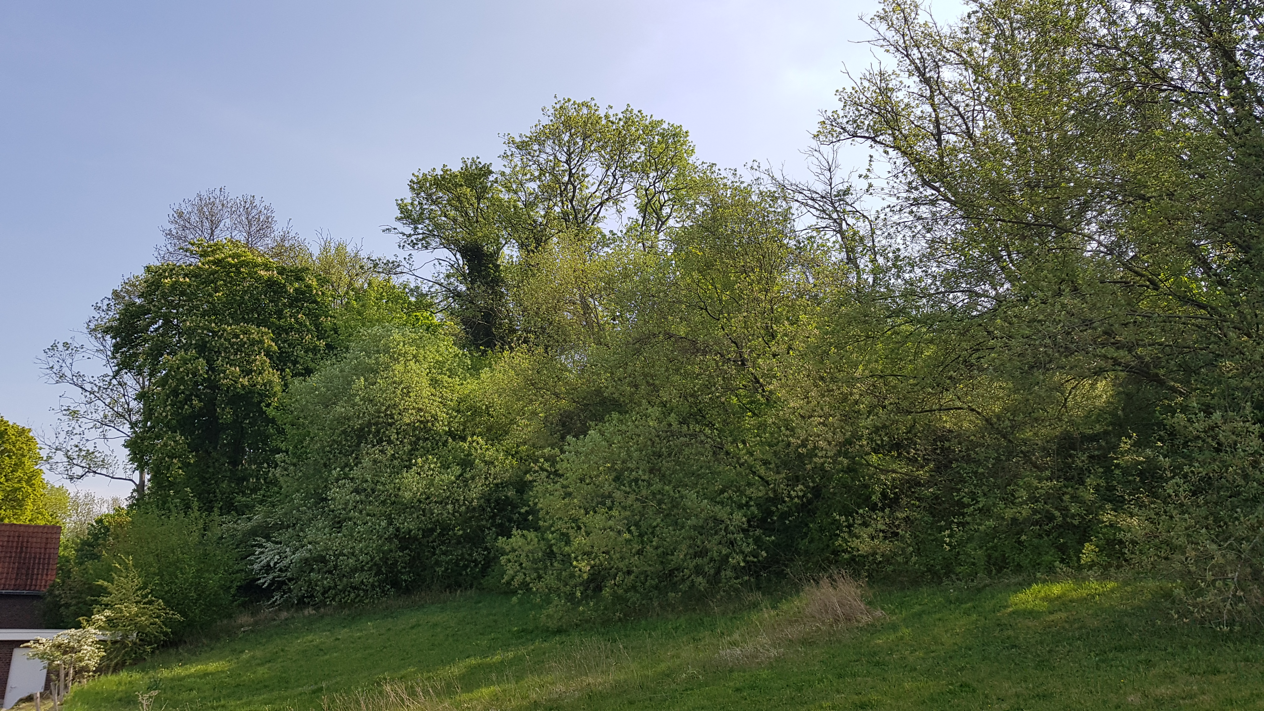 Groeve Sevensprong, Craubeek, Nederland